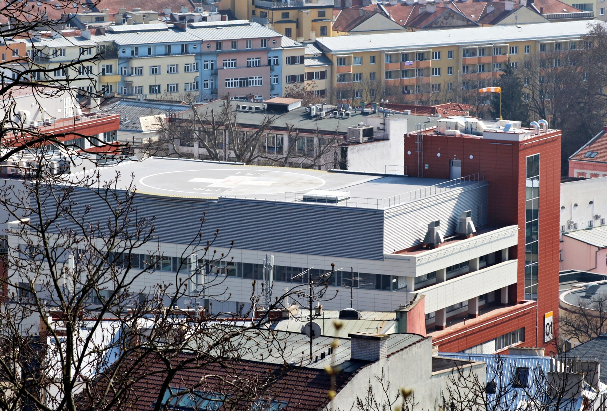 Nemocnie u sv. Anny v Brně, heliport